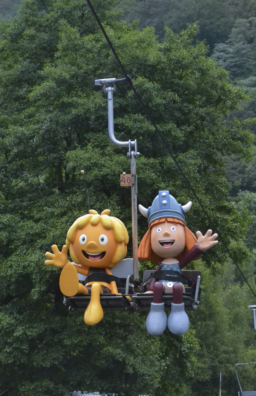 Beelden van Maya de Bij en Wickie de Viking op de zetellift in Plopsa Coo